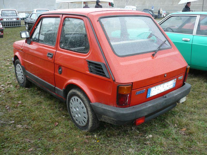 Photo prise à Montlhery en avril 2012